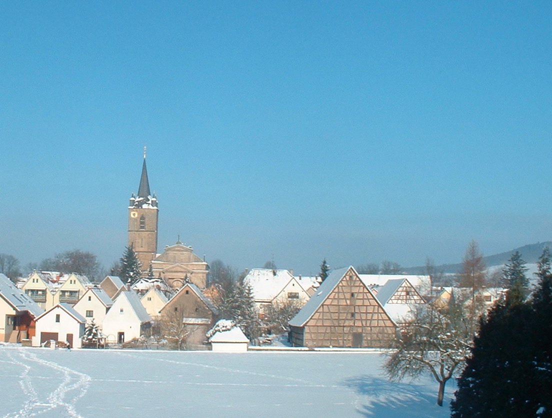 Die oberfränkische Gemeinde Eggolsheim mit Kirche im Winter